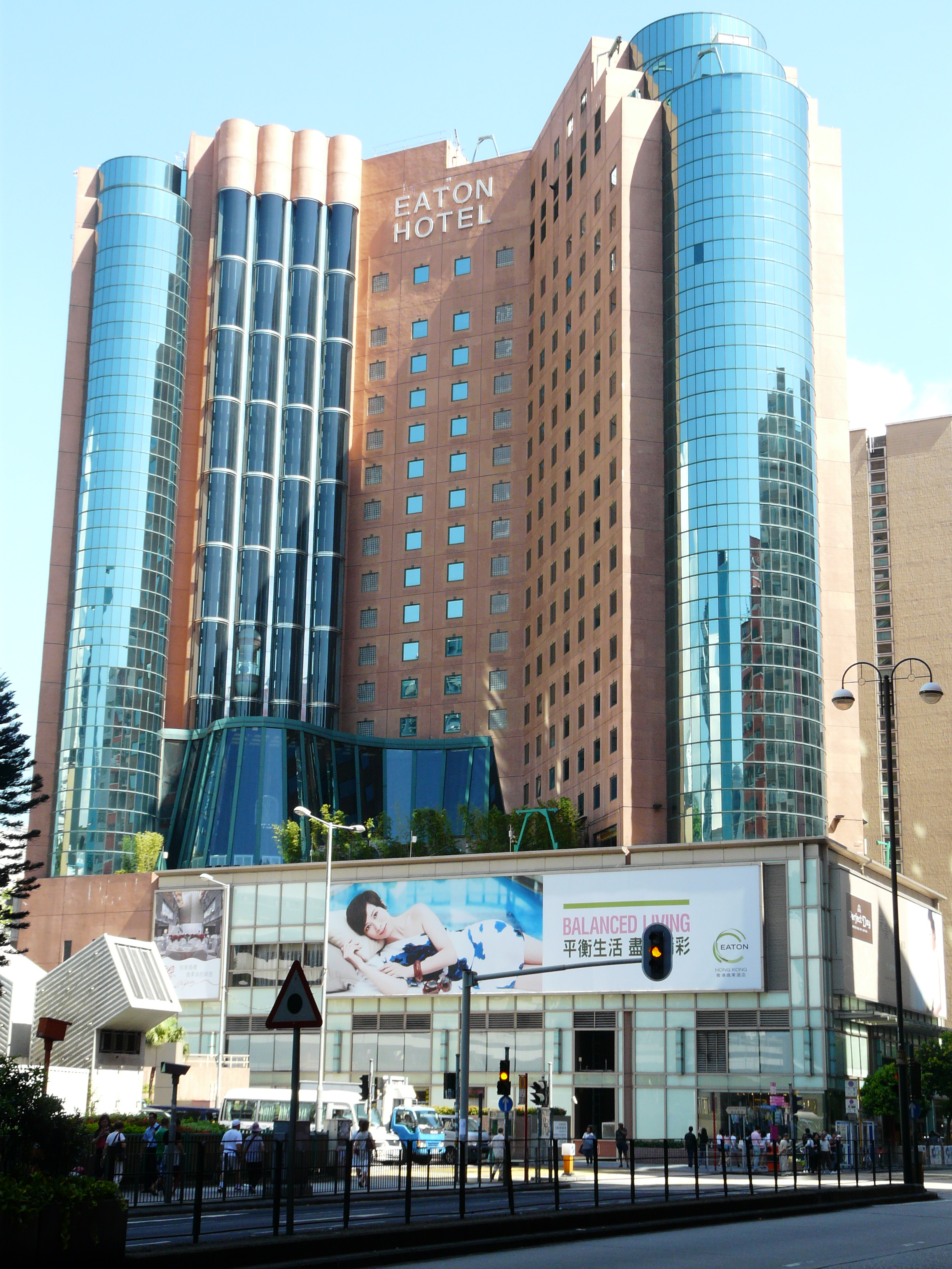 Hong Kong, 2013